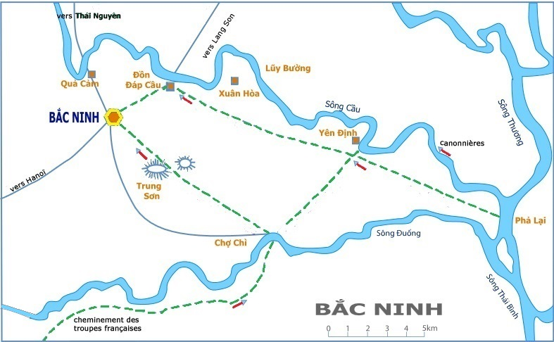 Une carte de la Campagne de Bac-Ninh .